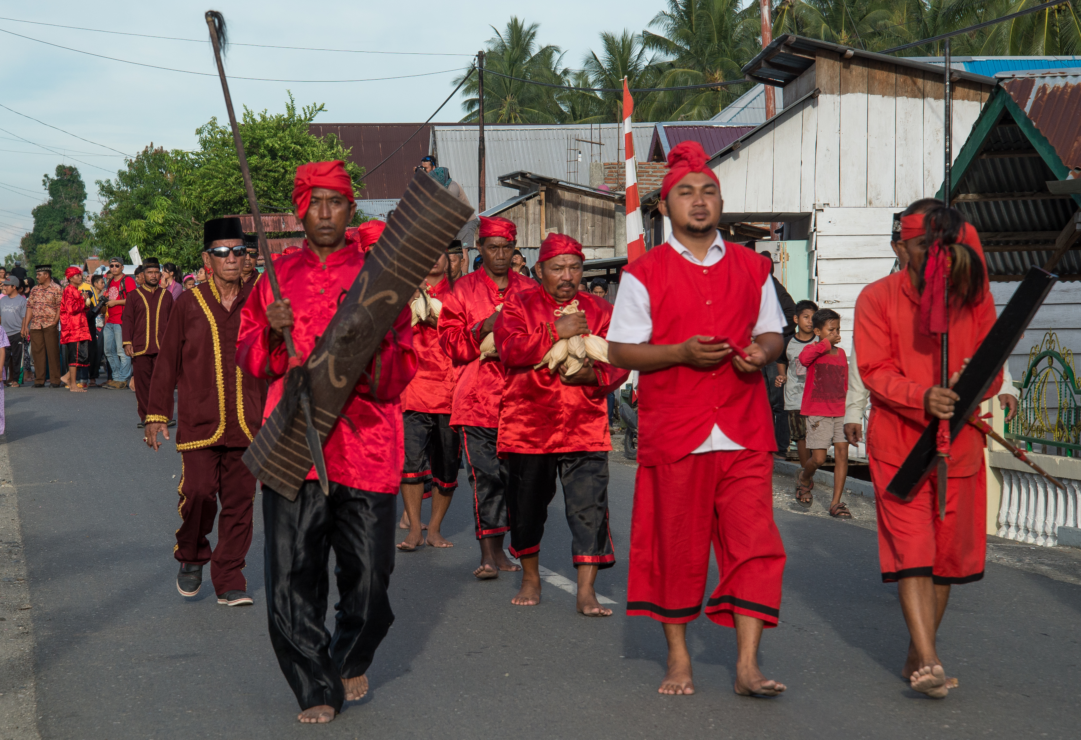 Malabot tumpe adalah upacara syukuran atas panen telur maleo